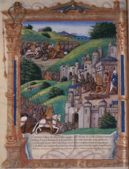 Prise de Vannes, enluminure du XVème ou XVIème siècle par Guillaume Fillastre